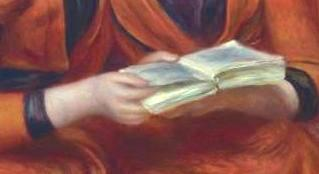 detail